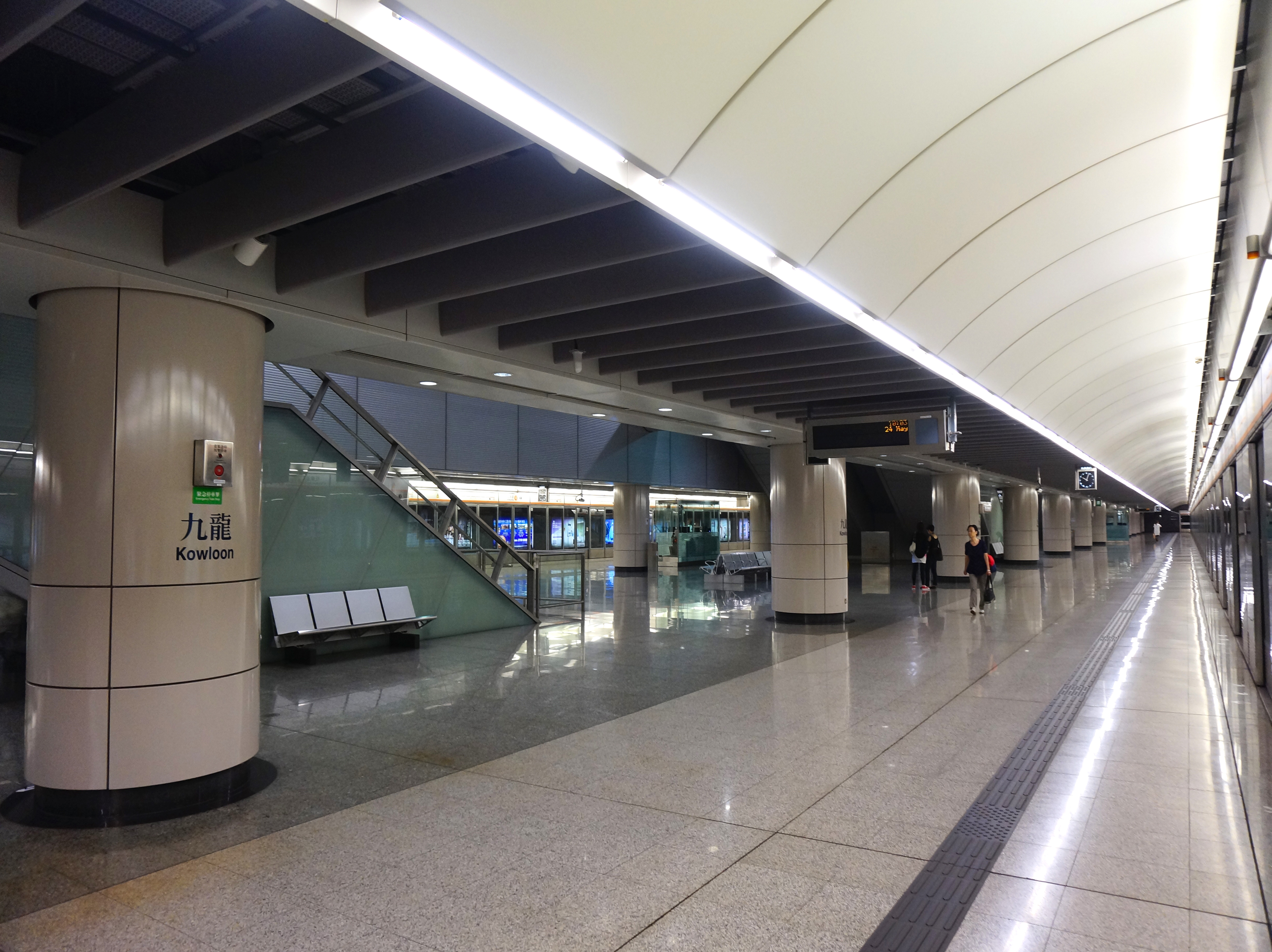 港鐵九龍站東涌線月台